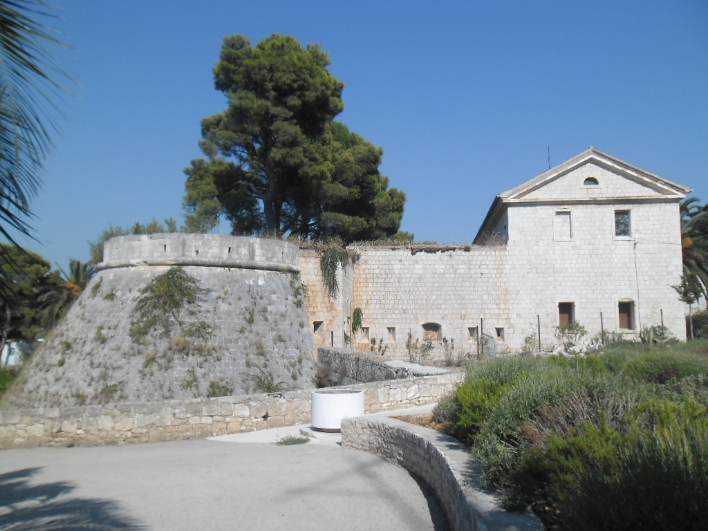 utvrda Gospina batarija na otoku Visu